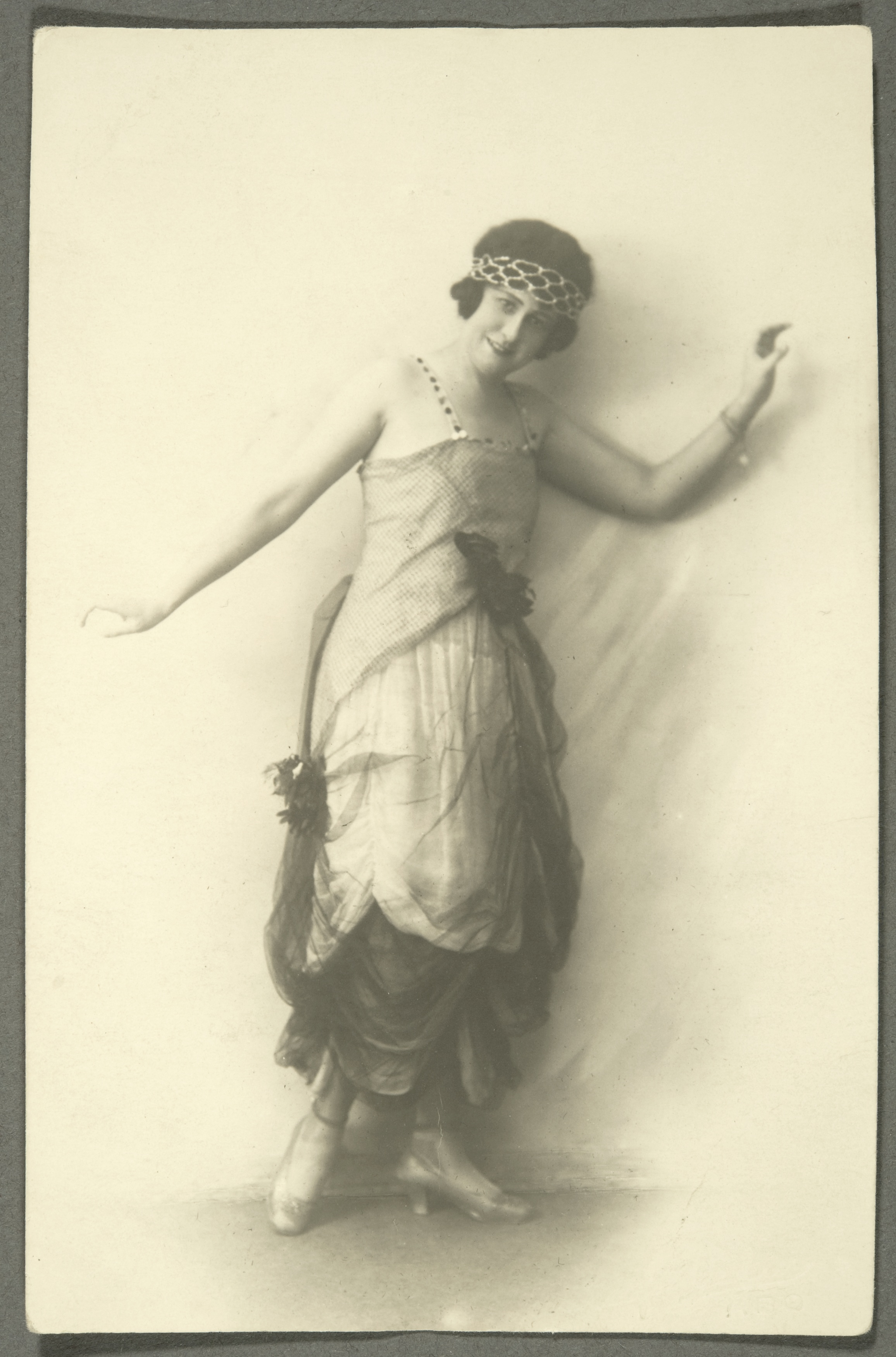 oopperalaulajatar Edda von Bidder-Ehrnrooth; pysty, mustavalkoinen